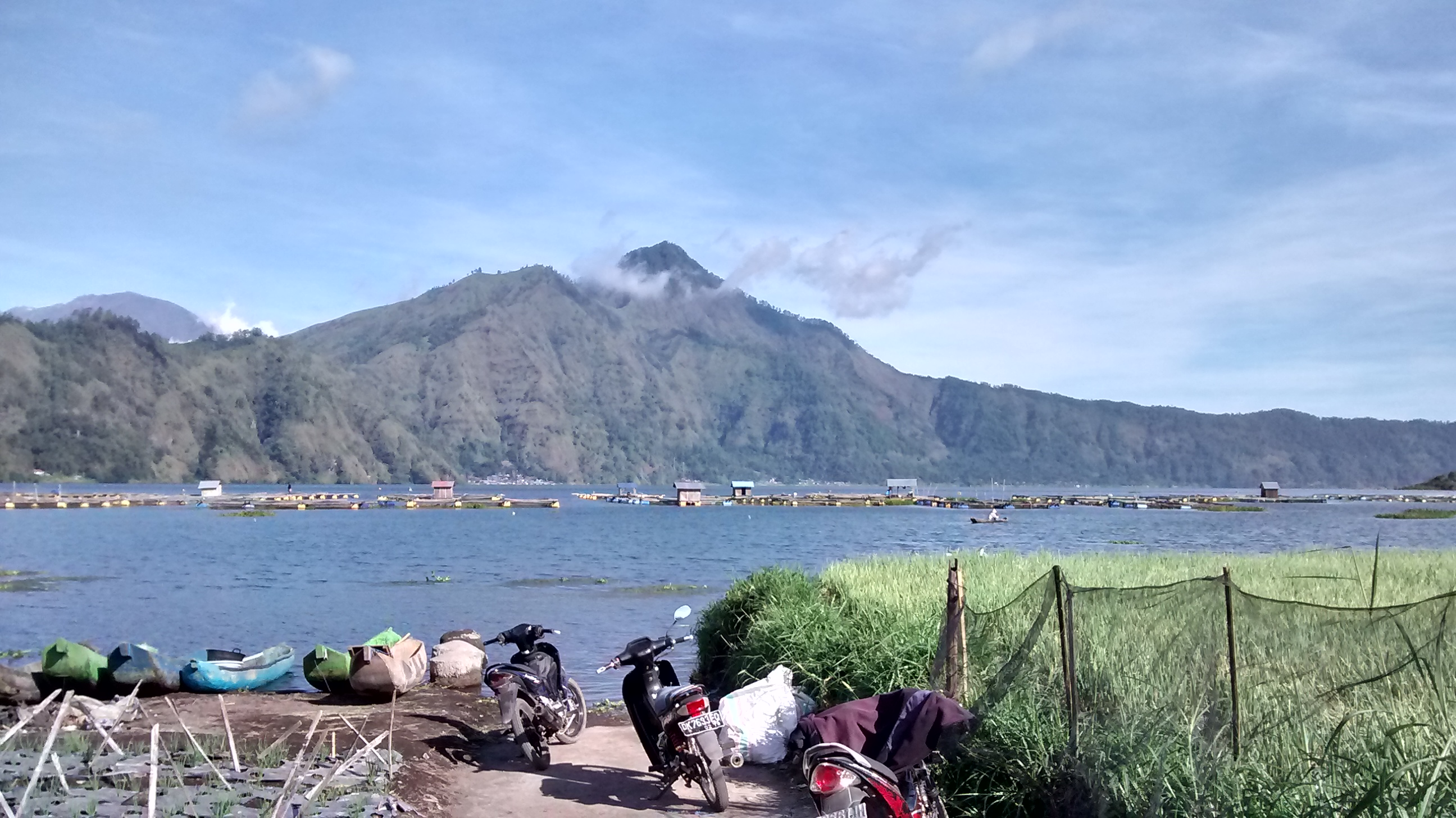 Songan B, Kintamani, Bangli Regency, Bali, Indonesia